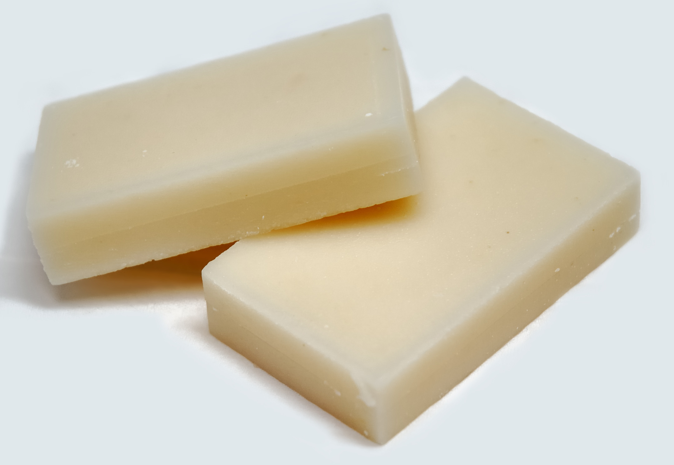 Mochi (餅、Image:Mochi_001.jpgの包装を取った物)